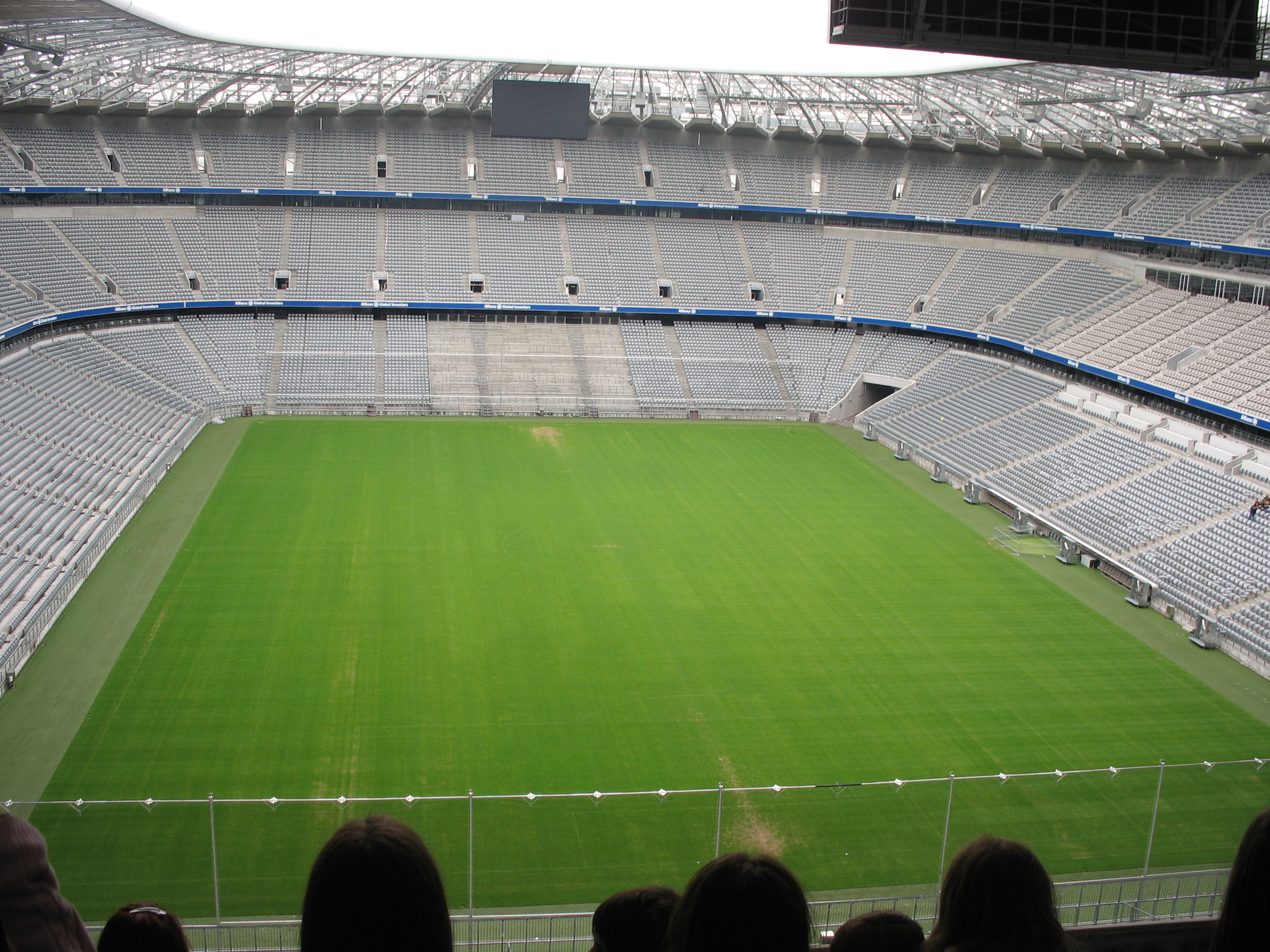 Allianz Arena v Münchnu.